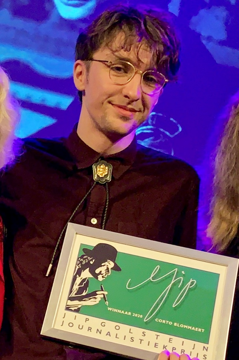 Winnaar van de negende Jip Golsteijn Journalistiekprijs Corto Blommaert. 24 februari 202 in Paradiso Amsterdam